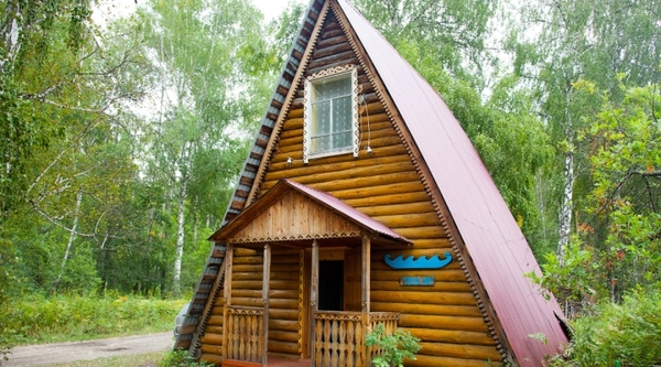 Rusiyanın Başqırdıstan ərazisində yerləşən karst mağarası. Ağidel çayı sahilində, eyni adlı Şulqan-Daş qoruğu ərazisində yerləşir. Mağara ibtidai icma quruluşu dövrünə aid (paleolit) qayaüstü rəsmləri ilə məşhurdur.